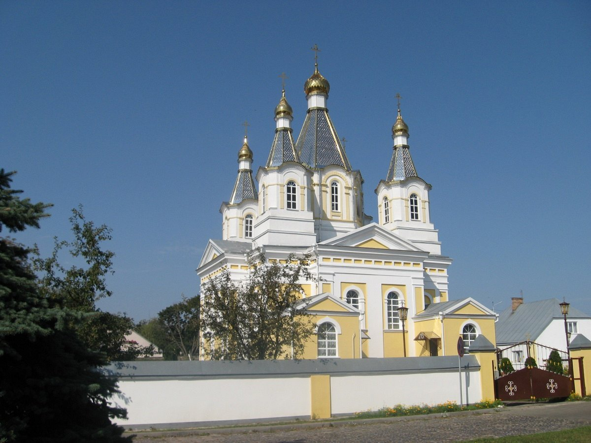 Кобрын. Царква